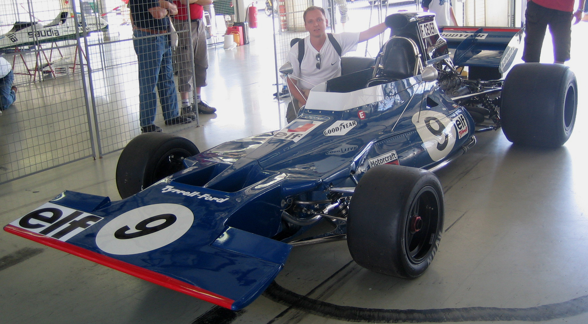 Tyrrell